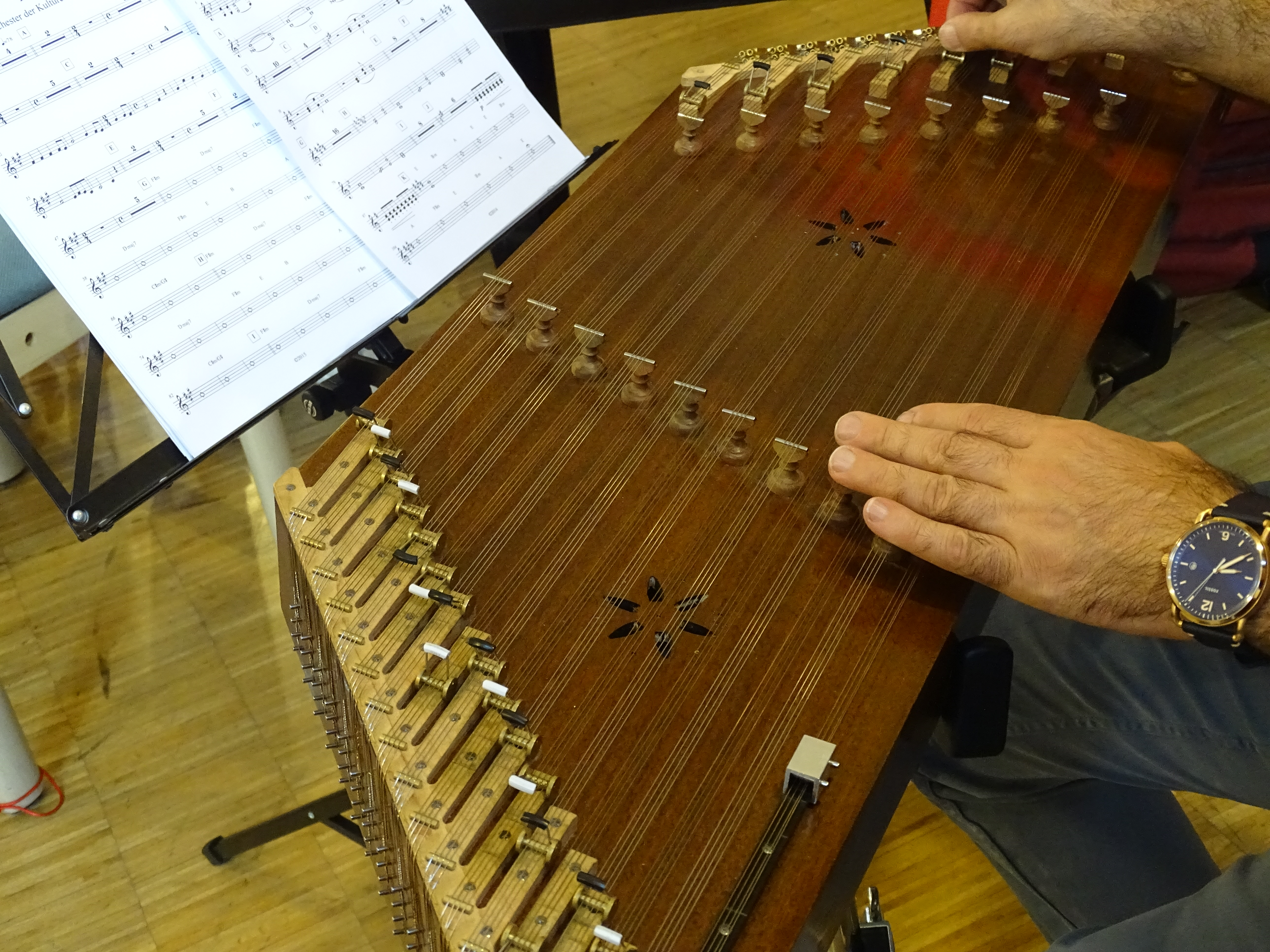 Santur, iranisches Hackbrett. Die unterste Saitenreihe lässt sich mittels einem Schieber in der Tonhöhe wie mit einem Kapodaster verändern und auf einen entsprechenden Grundton enstellen. Kleine schwarze und weiße Hebel können die Saiten um einen halben Ton verändern, um Halbtöne oder Vierteltöne spielen zu können. Dieses Instrument wurde von Herr Kourosh Zolani und Herr Mohssen Behrad entwickelt.